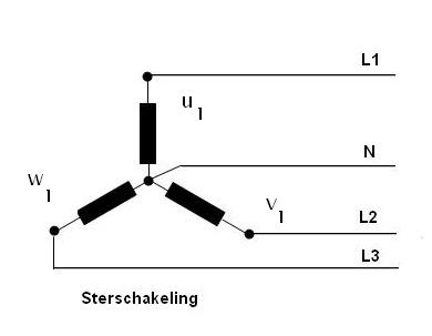 DFoor auteur opgezet en uiotgevoerd vectordiagram, zonder auteursrechten.